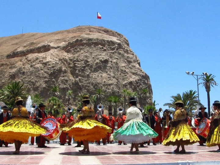 Morro de Arica, en el día del Carnaval Andino "Con la Fuerza del Sol". Bailes y música autóctonos de todo el Altiplano Chileno, Boliviano y Peruano. This is a photo of a national monument in Chile: 521